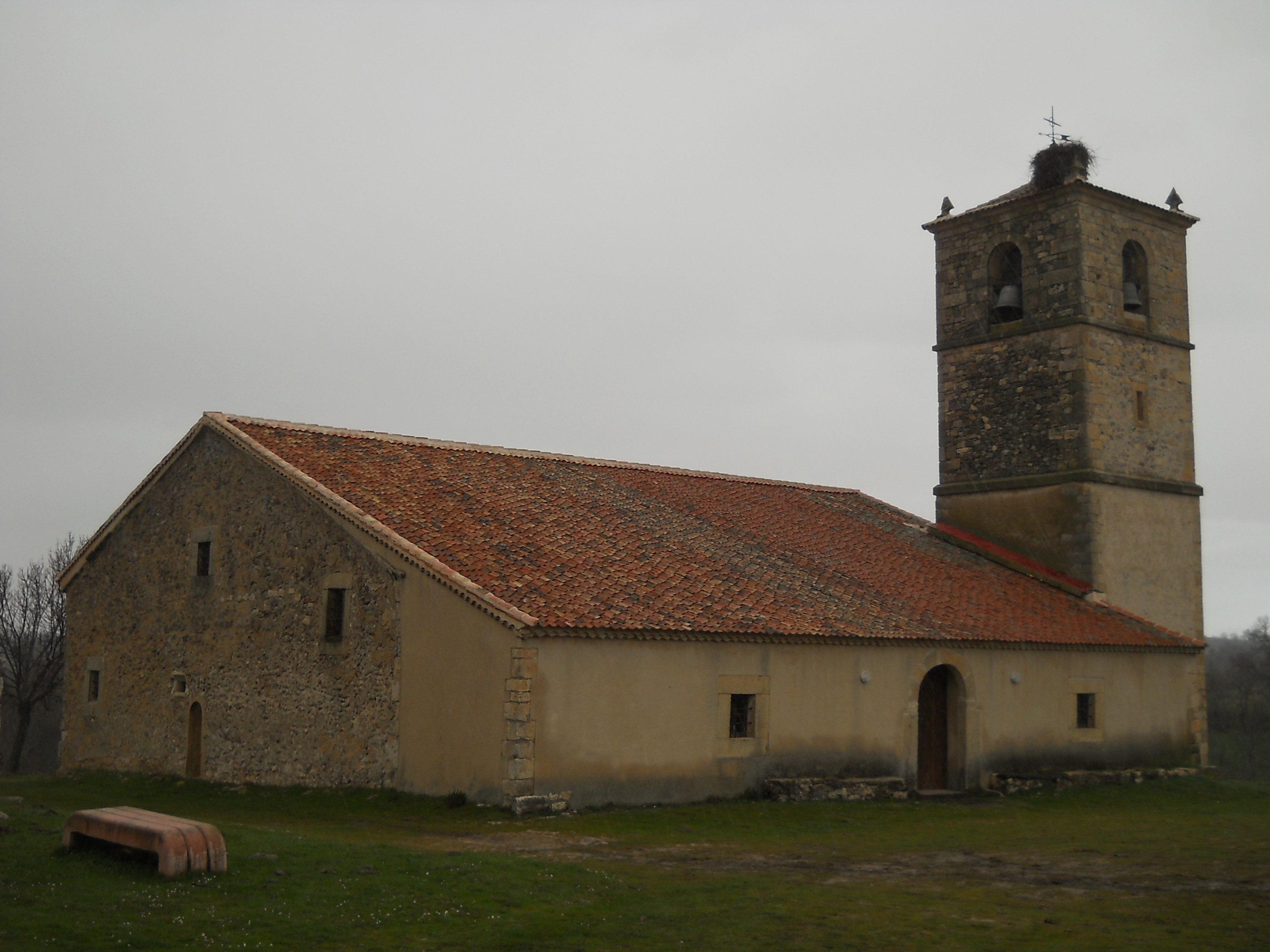 Chiesa di Nostra Signora dell'Assunzione, Aldealengua de Pedraza, Segovia, Spagna